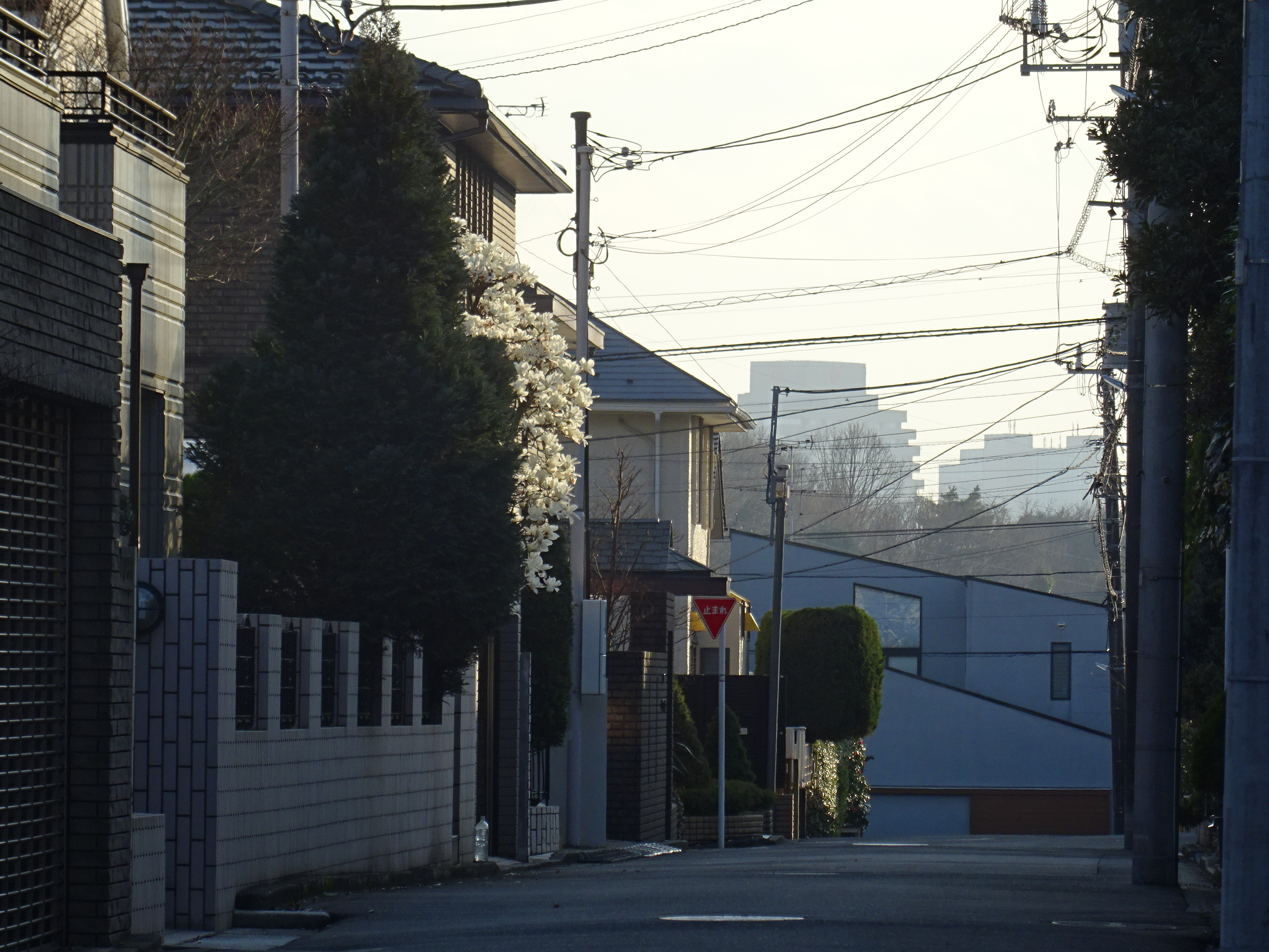 東京都多摩市桜ケ丘三丁目160319